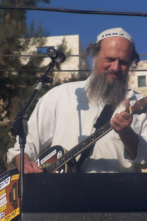 עדי רן בהופעה בחברון - סוכות תשס"ז